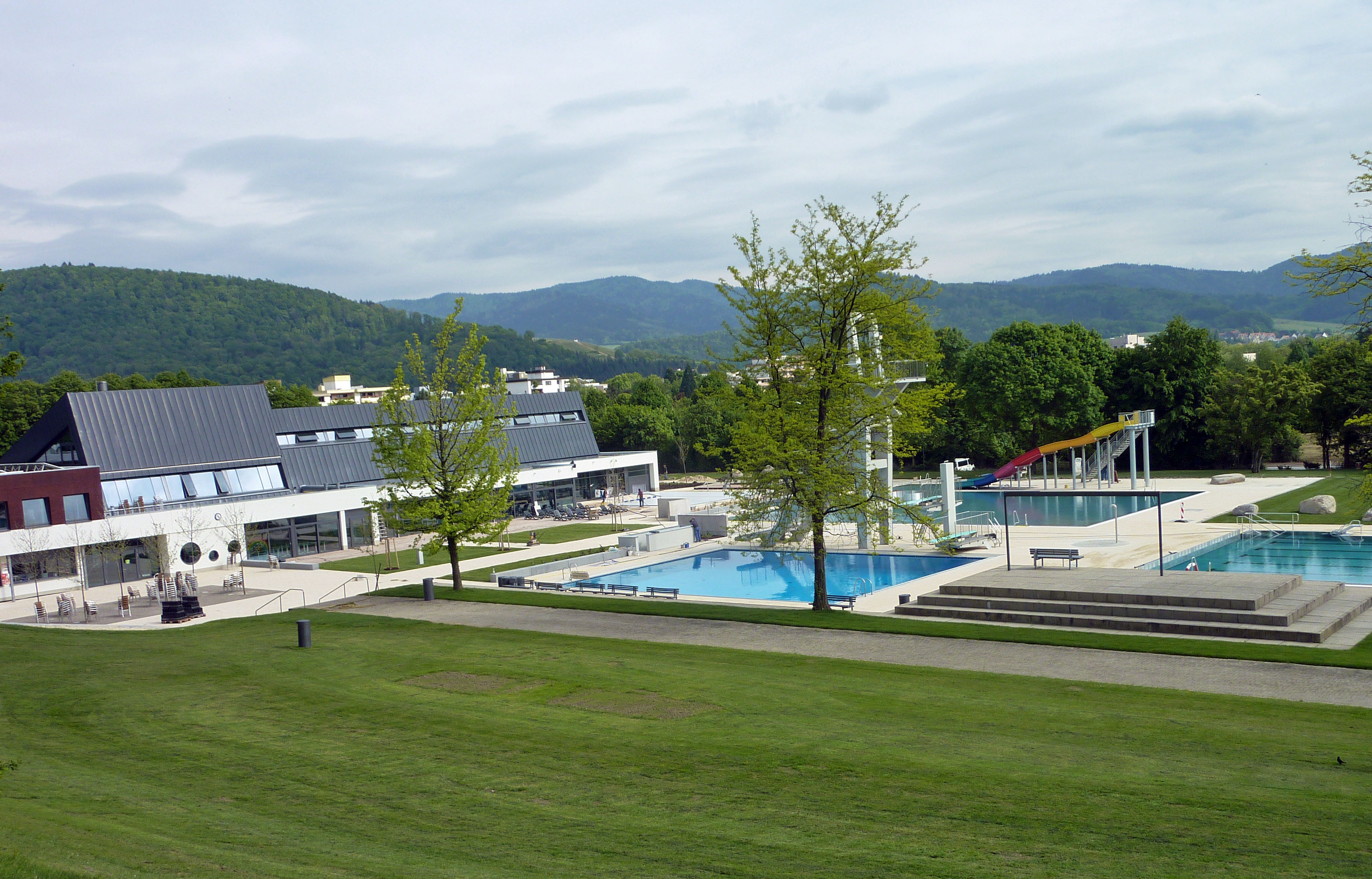 Das 1973/74 erbaute Denzlinger Sportbad wurde nach 33 Jahren Dauerbetrieb von Oktober 2008 bis Mai 2010 grundlegend saniert und neugestaltet. Eröffnung unter dem Namen MACH' BLAU am 21. Mai 2010.